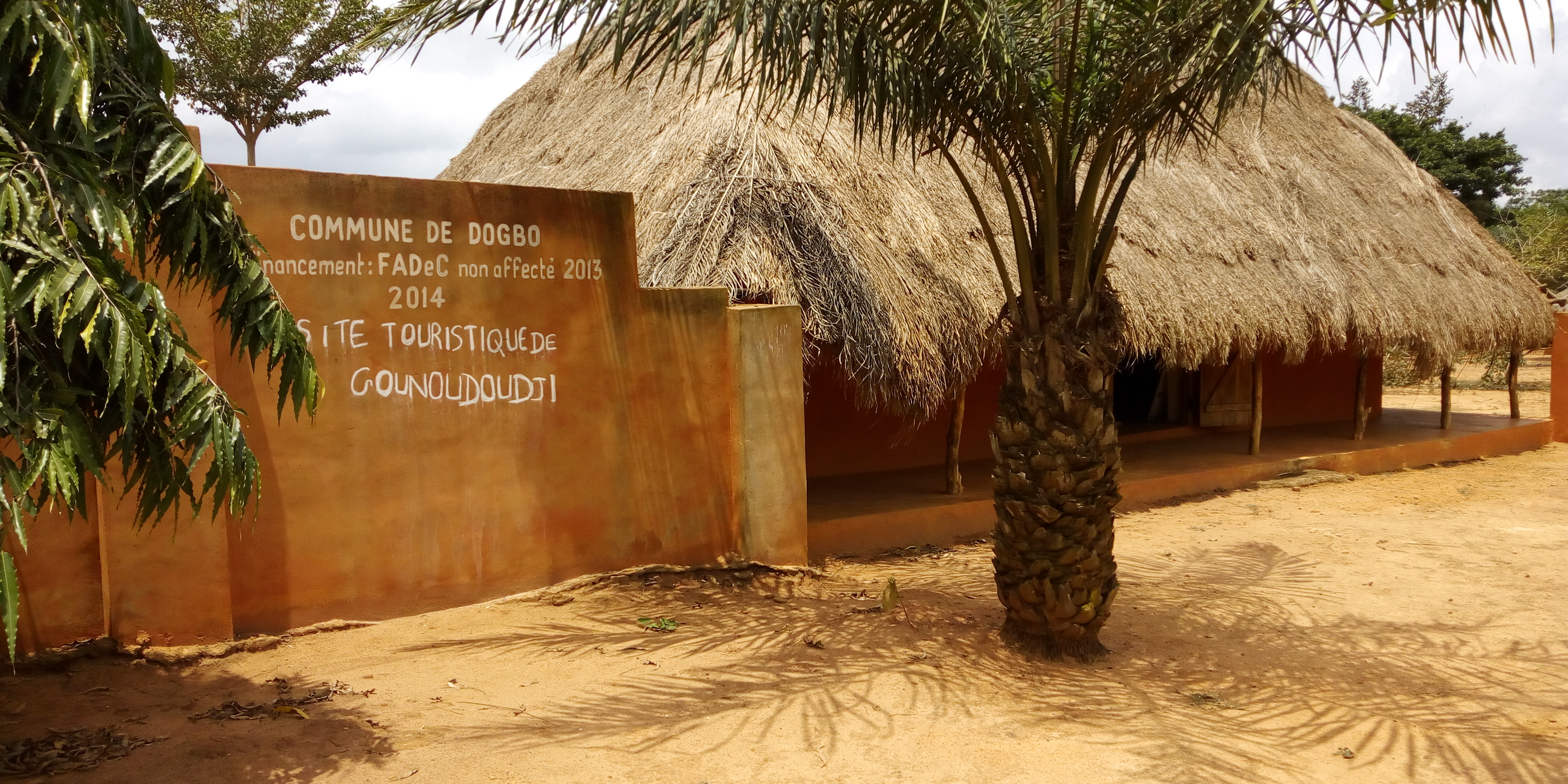 Vue d'entrée du site des hommes à queue à Goundoudji dans la commune de Dogbo au Bénin